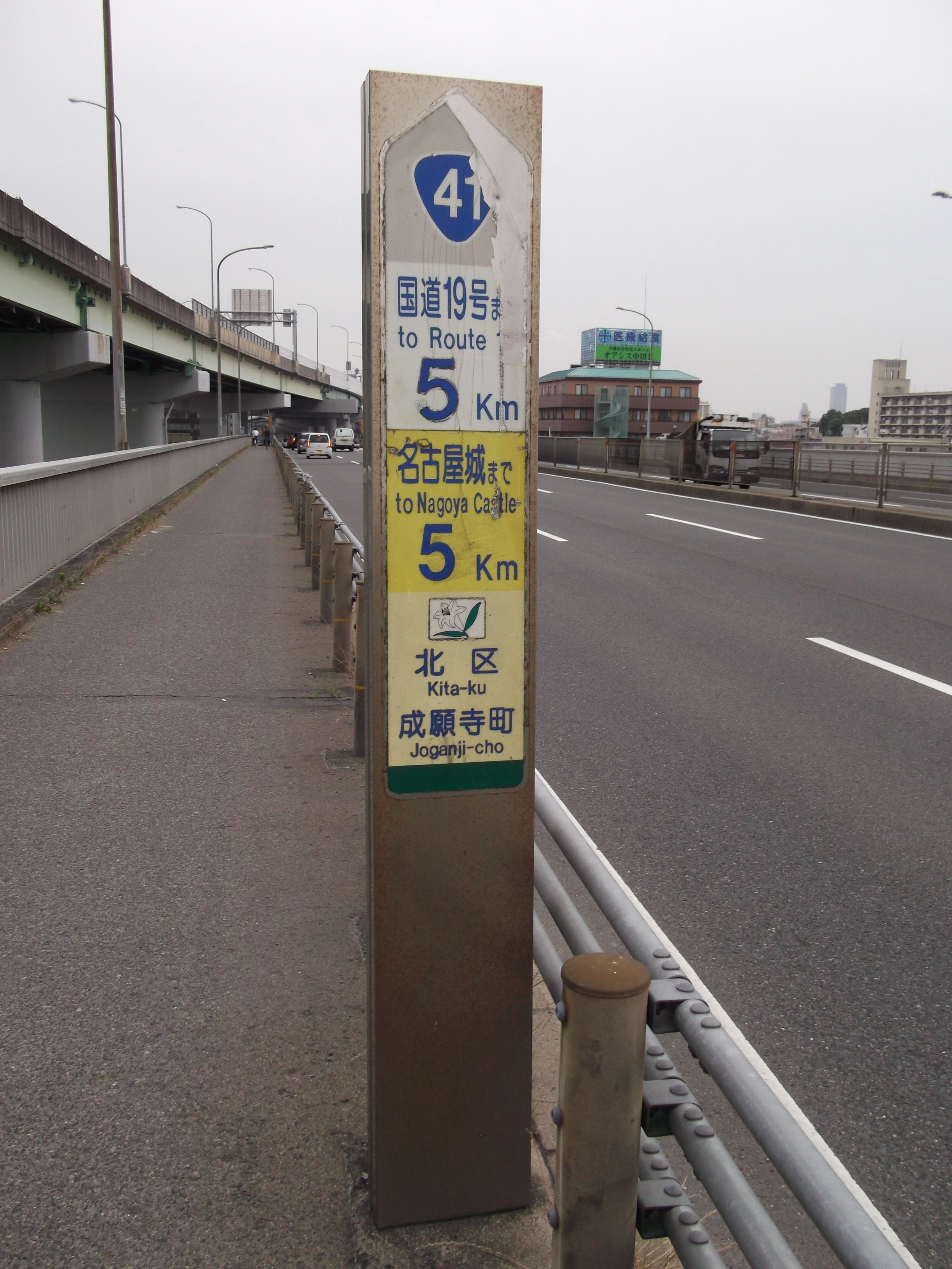 国道41号新川中橋上にある距離表示板